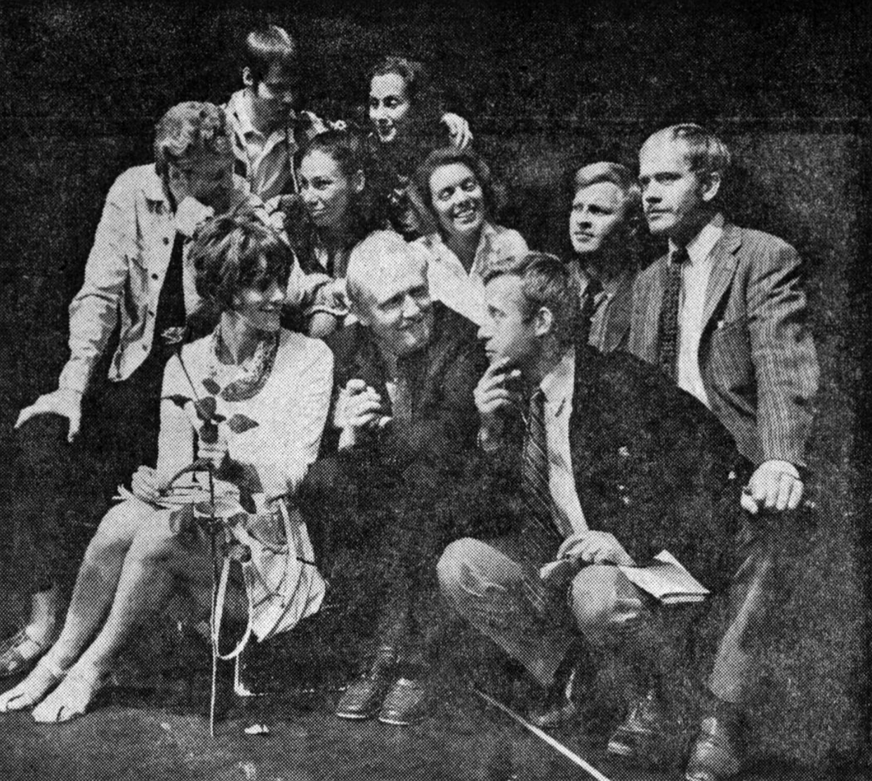 Stockholms stadsteaters nya, inför spelåret 1968-69. Bakre raden: Keve Hjelm, Lennart Svensson, Gurie Nordwall, Marianne Aminoff, Jane Friedmann, Gustaf Elander och Per Myrberg. Främre raden: Agneta Ekmanner, Björn Gustafson och Per Sjöstrand.